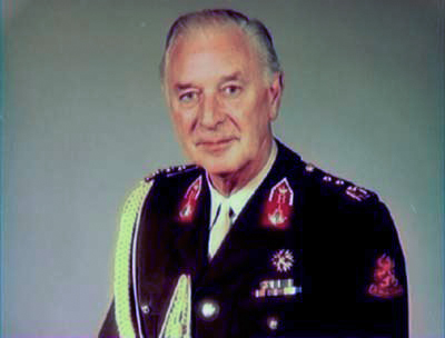 Luitenant-generaal T.J. (Bob) de Geus, inspecteur-generaal der Krijgsmacht.